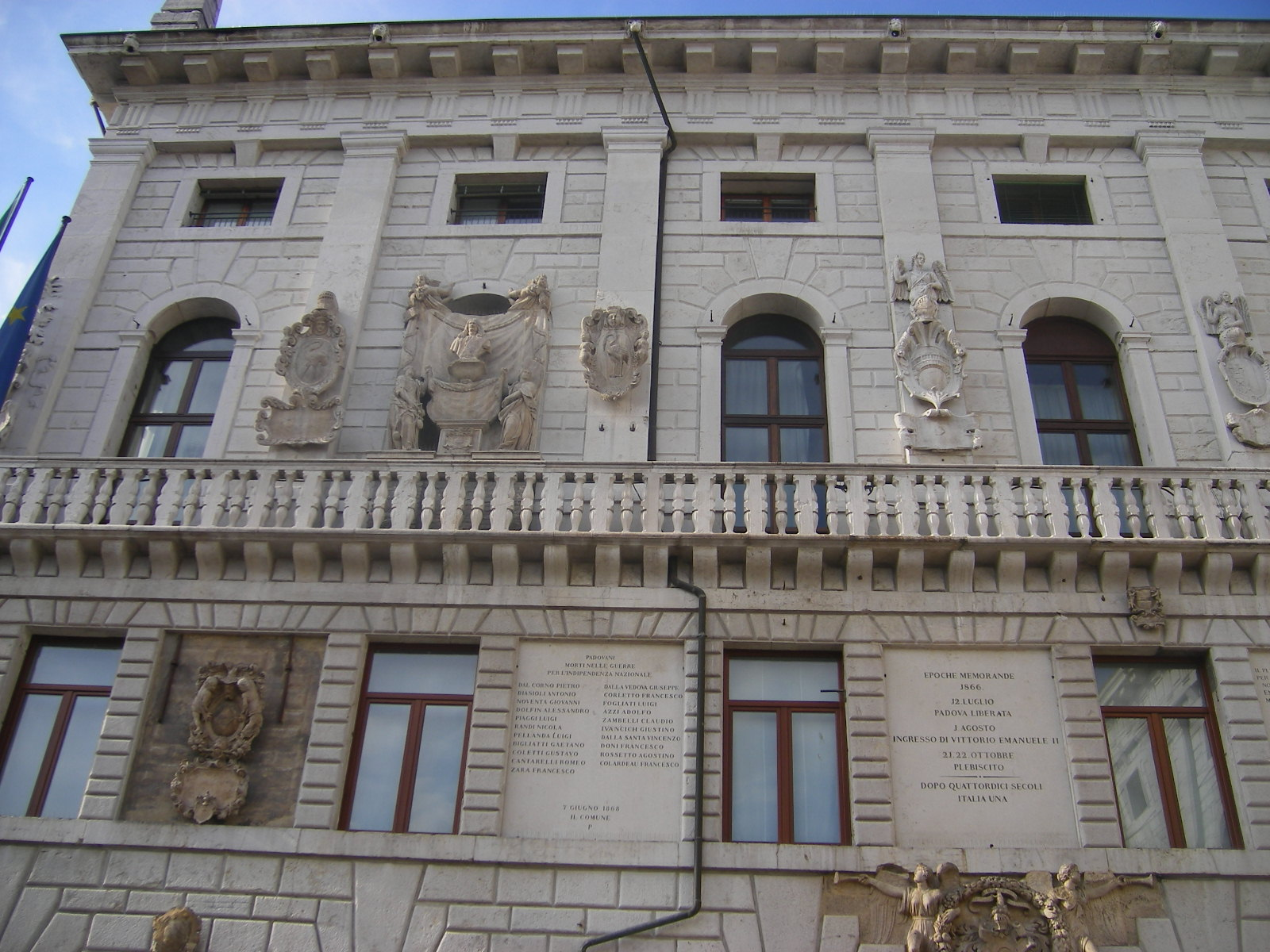 Padova